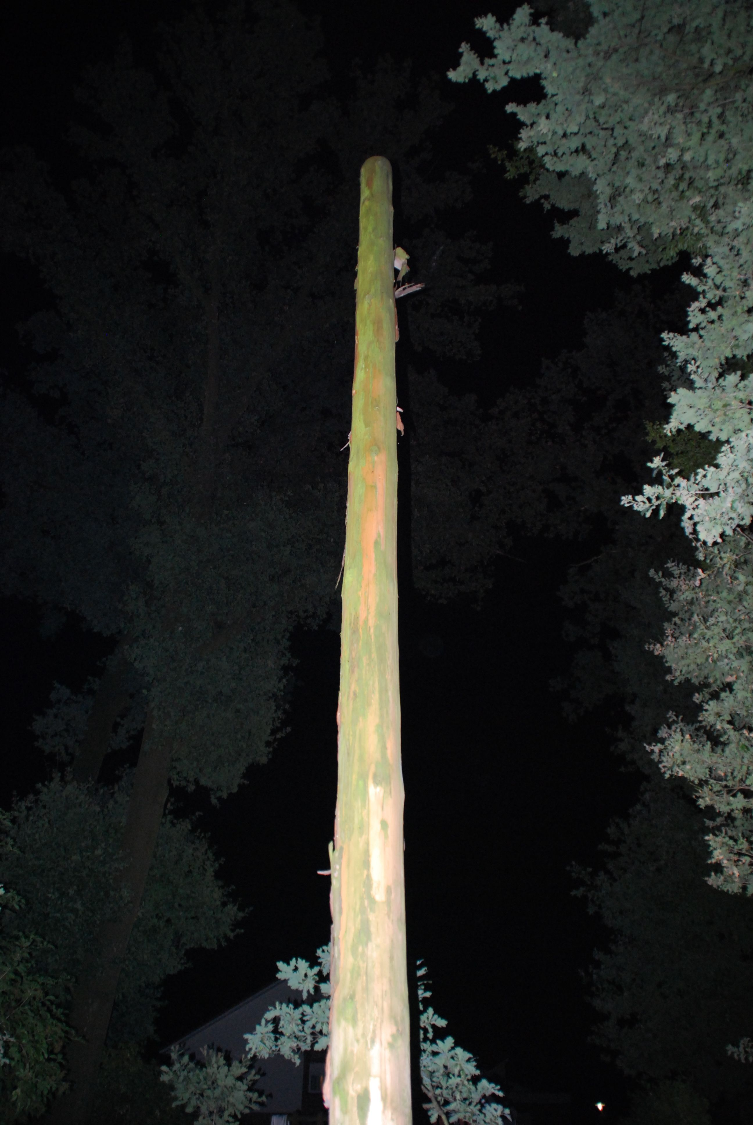 Ein Bannerstmast, jedoch ohne Wimpel